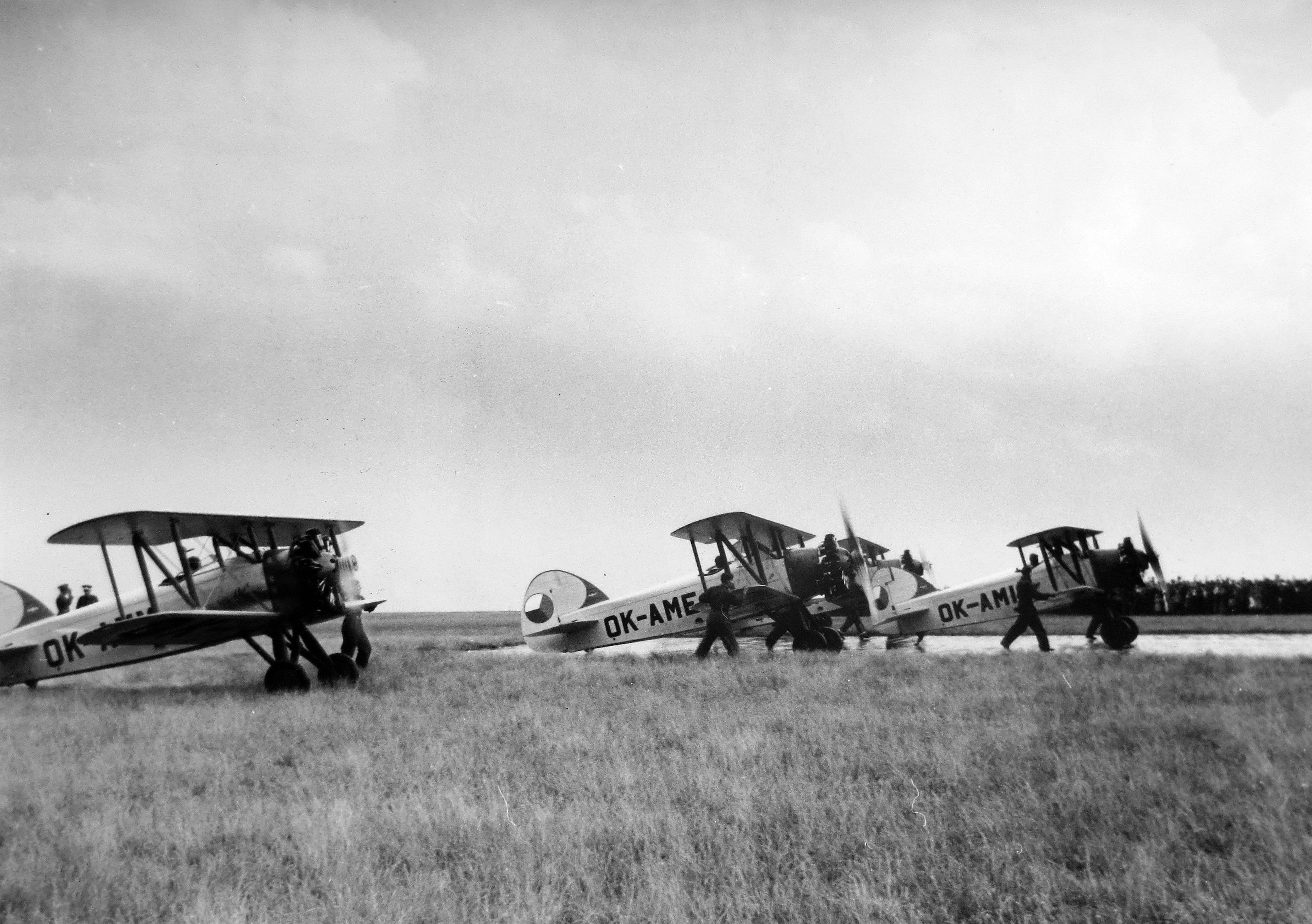 Walter Castor II a 3x Avia Ba-122 v Bukurešti (1935)